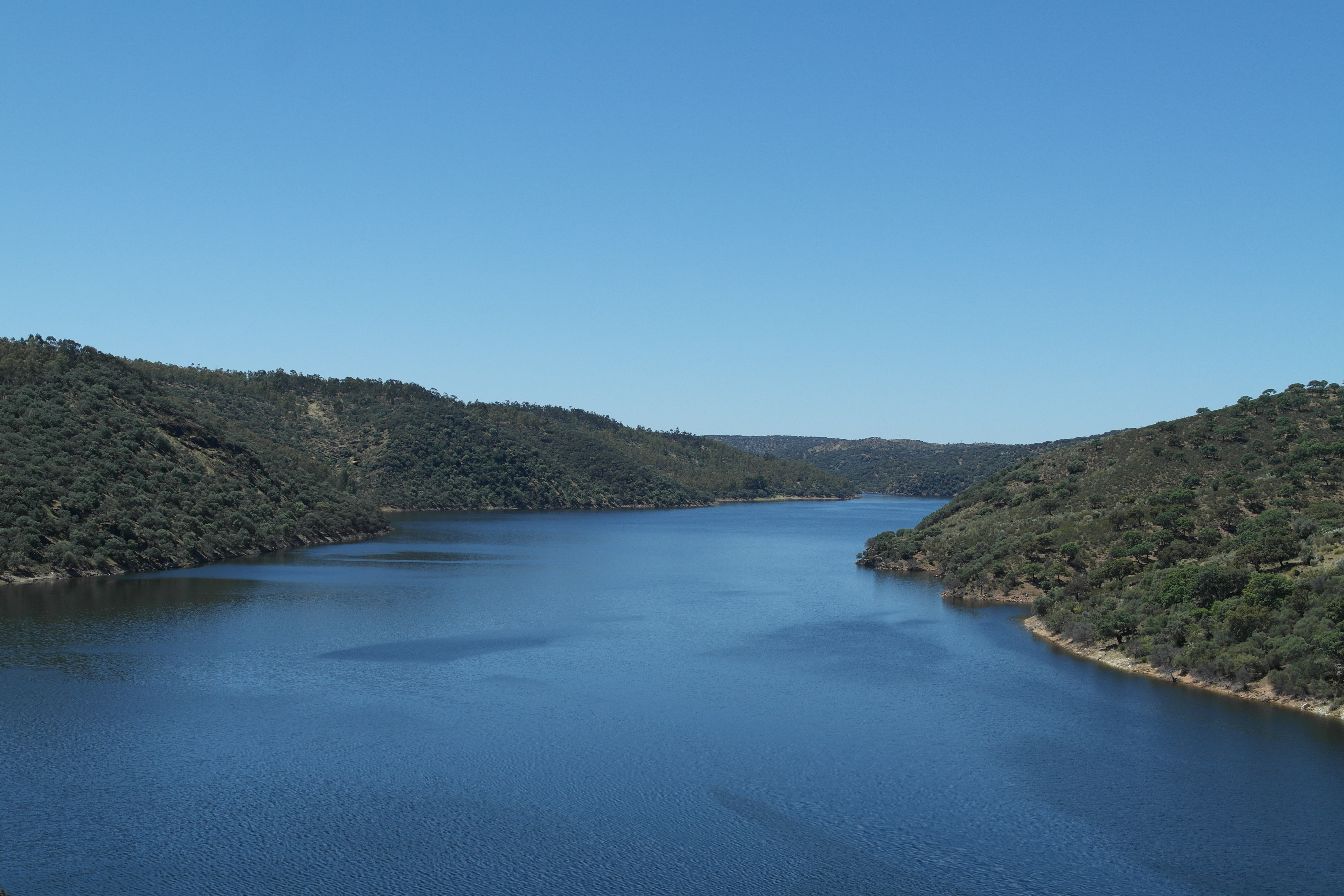 El Río Tajo a su paso por el Parque de Monfragüe This is a photography of a Special Area of Conservation in Spain with the ID: ES4320077. Natura2000 entry, EEA entry